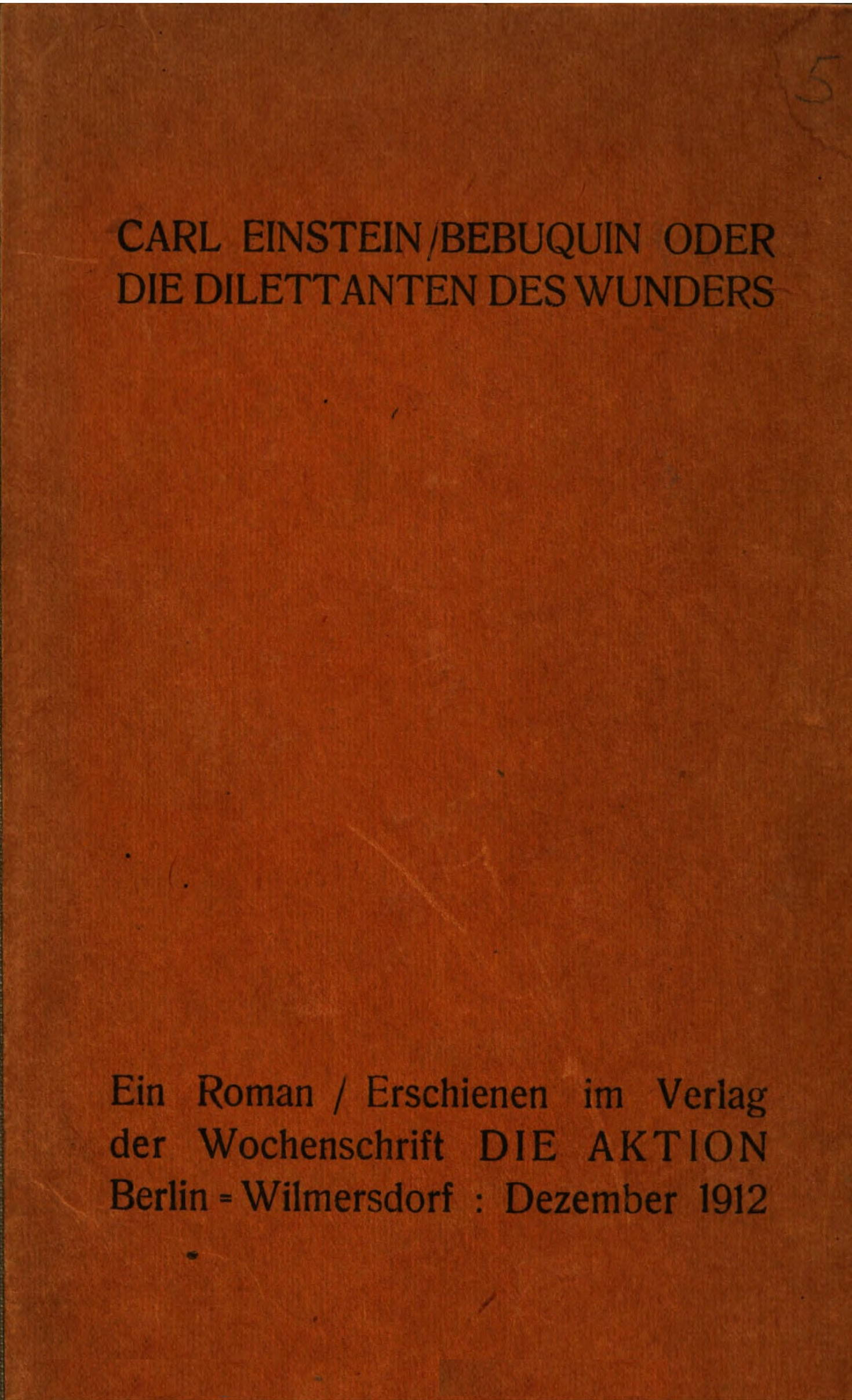 Carl Einstein: Bebuquin oder die Dilettanten des Wunders, Roman, Verlag Die Aktion, 1912